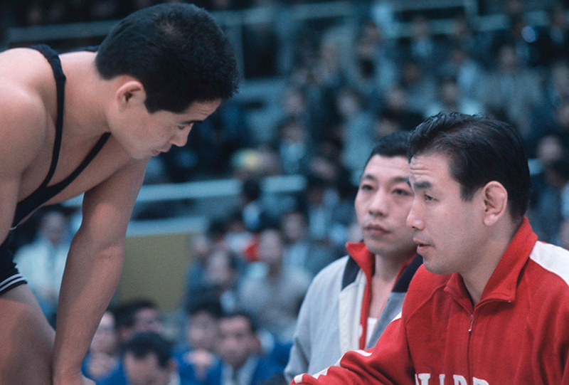 Osamu Watanabe and Shozo Sasahara, 1964 Olympics